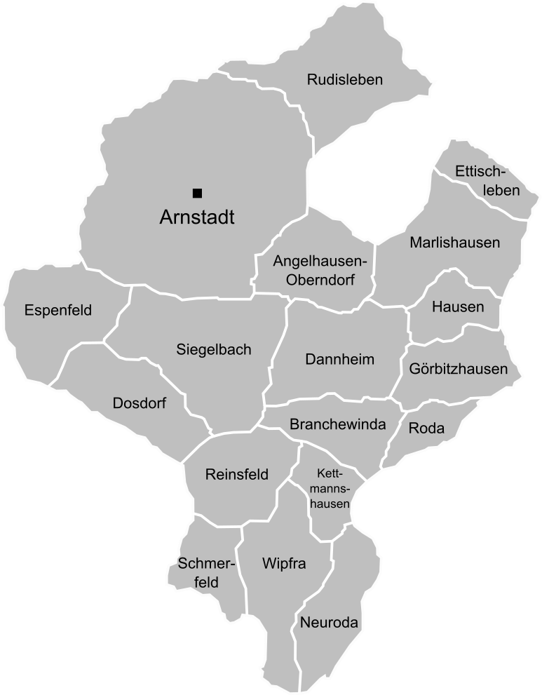 Ortsteile von Arnstadt